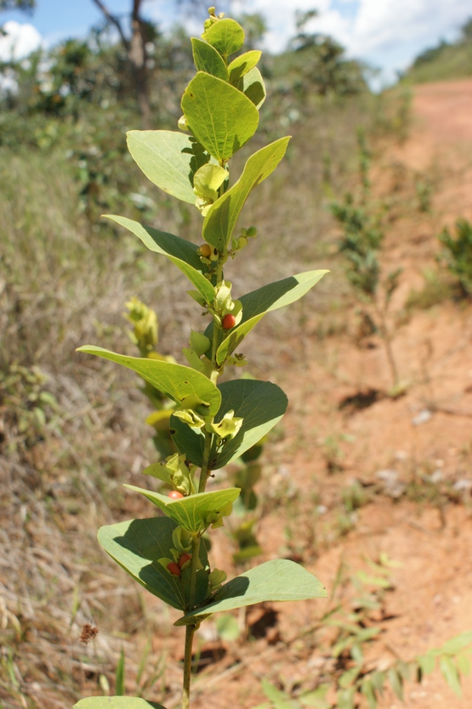 Cissampelos ovalifolia DC. - MENISPERMACEAE - Jardim Botânico de Brasília - Distrito Federal - Brasil.